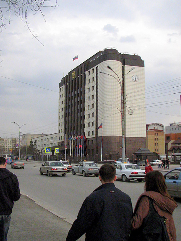 Federacia arbitracia tribunalo de la Okcident-Siberia distrikto (Tjumeno, Rusio)